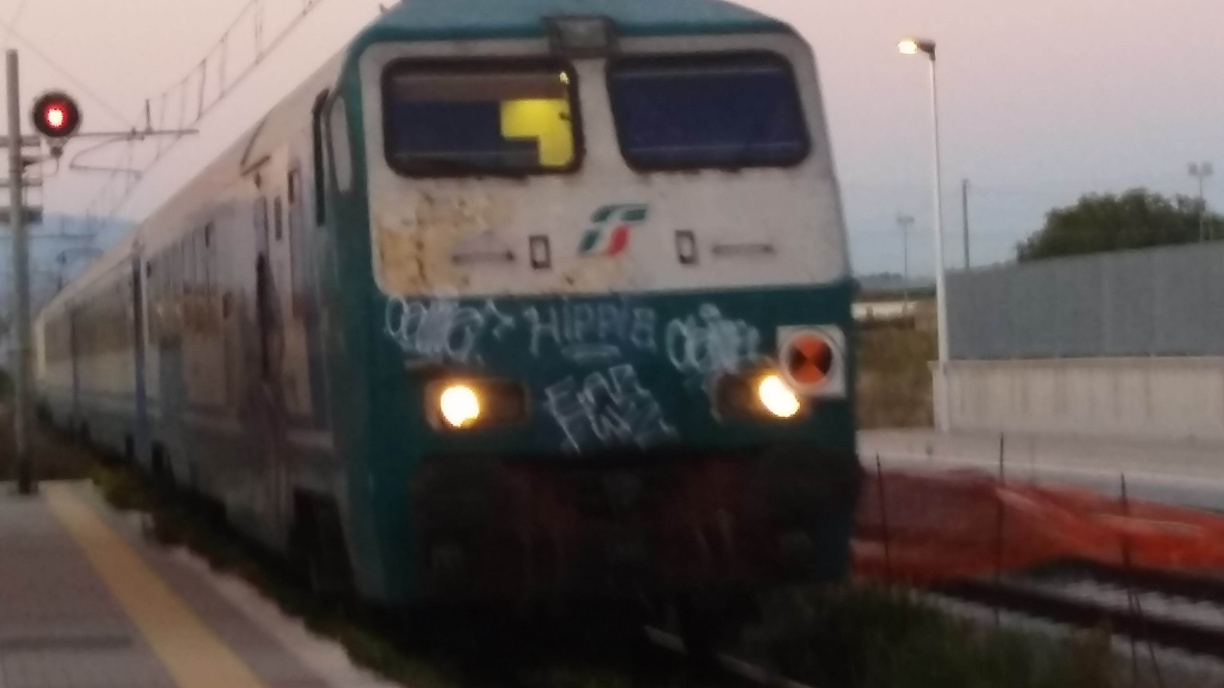 Regionale 12737 Sibari-Cosenza in arrivo alla stazione San Marco-Roggiano. Il convoglio è moderno come la stazione appena restrutturata.